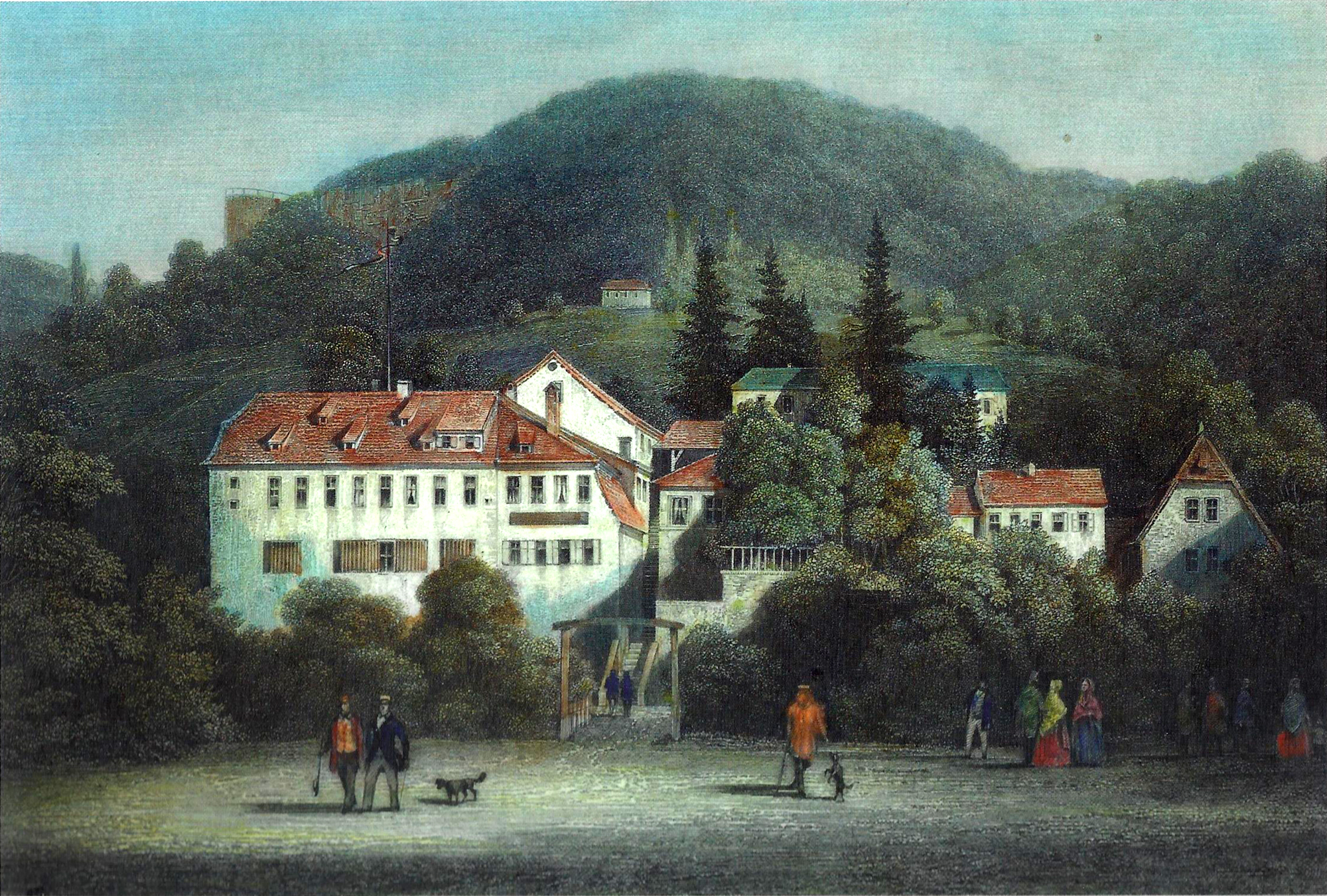 Gemälde des Heidelberger Riesensteins mit dem Corpshaus der Saxo-Borussia